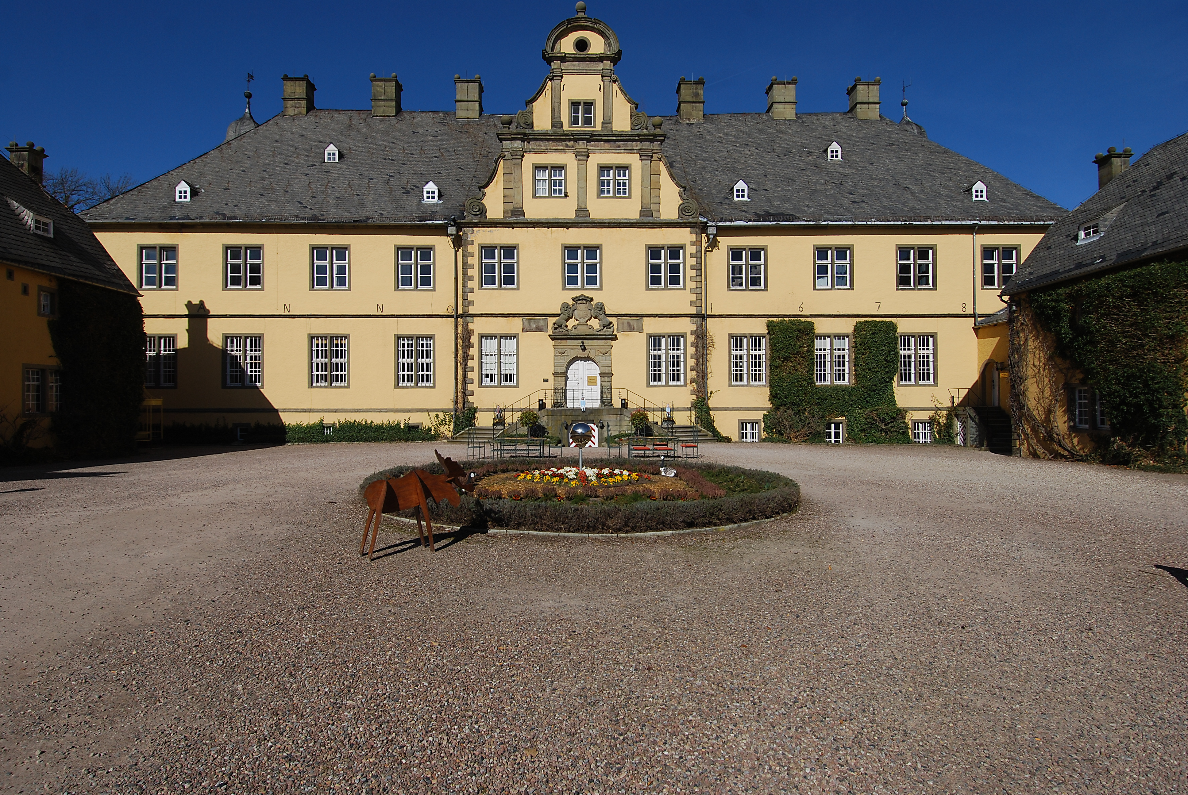 Schloss Eringerfeld an der Steinhauser Straße im Stadtteil Eringerfeld der Stadt Geseke im Kreis Soest in Nordrhein-Westfalen This is a photograph of an architectural monument.